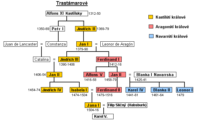 Rodokmen kastilských, aragonských (a navarrských) králů z dynastie Trastámara.